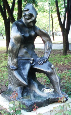 Фотографија скулптуре Матија Вуковић Перун 1962. година, налази се испред зграде Архива града Нови Београд. Аутор фотографије Nicolo